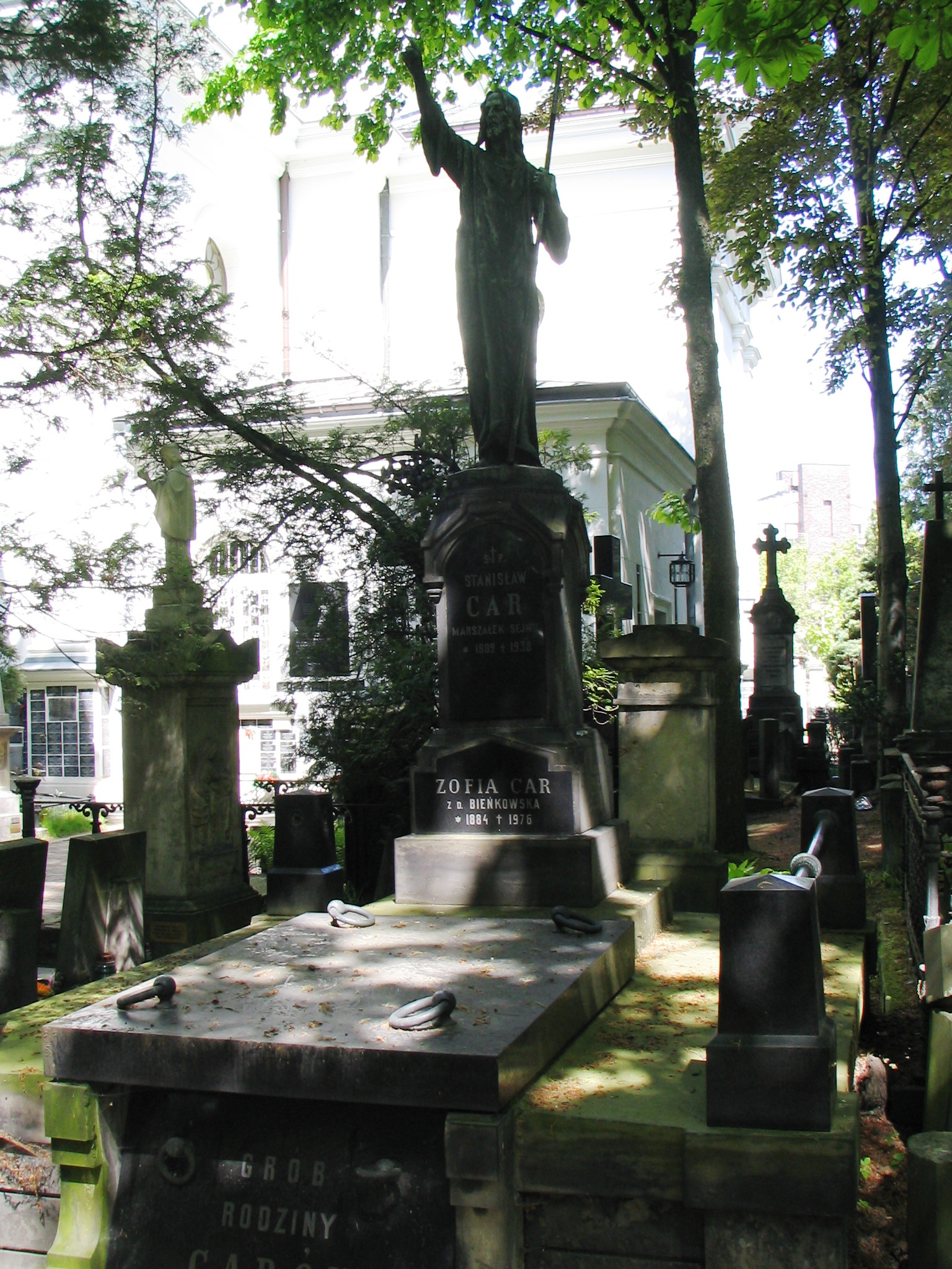 Nagrobek Stanisława Cara i jego żony Zofii na Cmentarzu Powązkowskim, Warszawa. Stanisław Car.